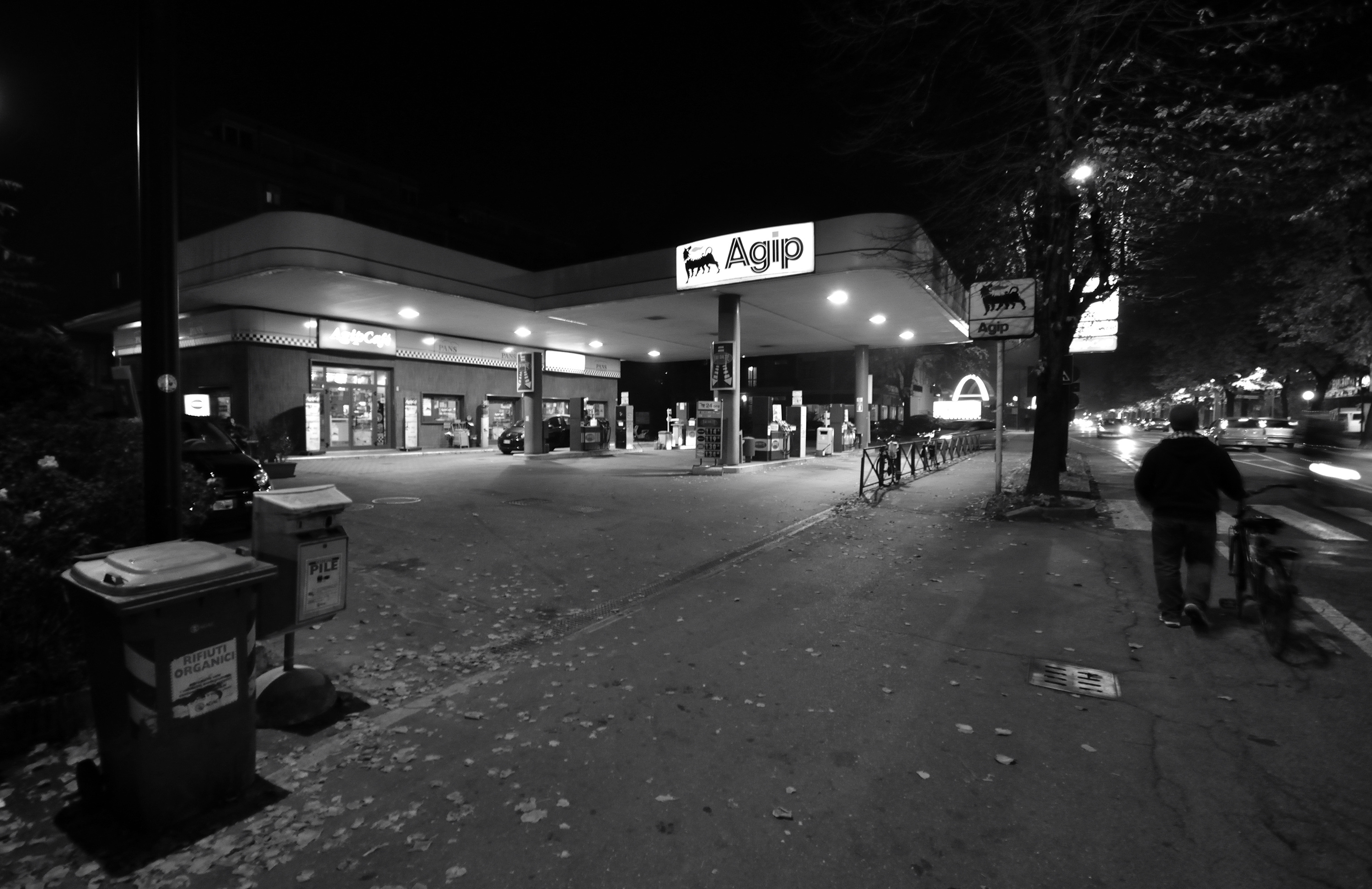 Via Emilia all'Ospizio - Reggio Emilia, Italia